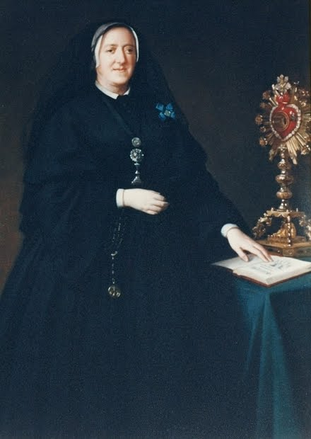 St. Maria Micaela Desmaisìères